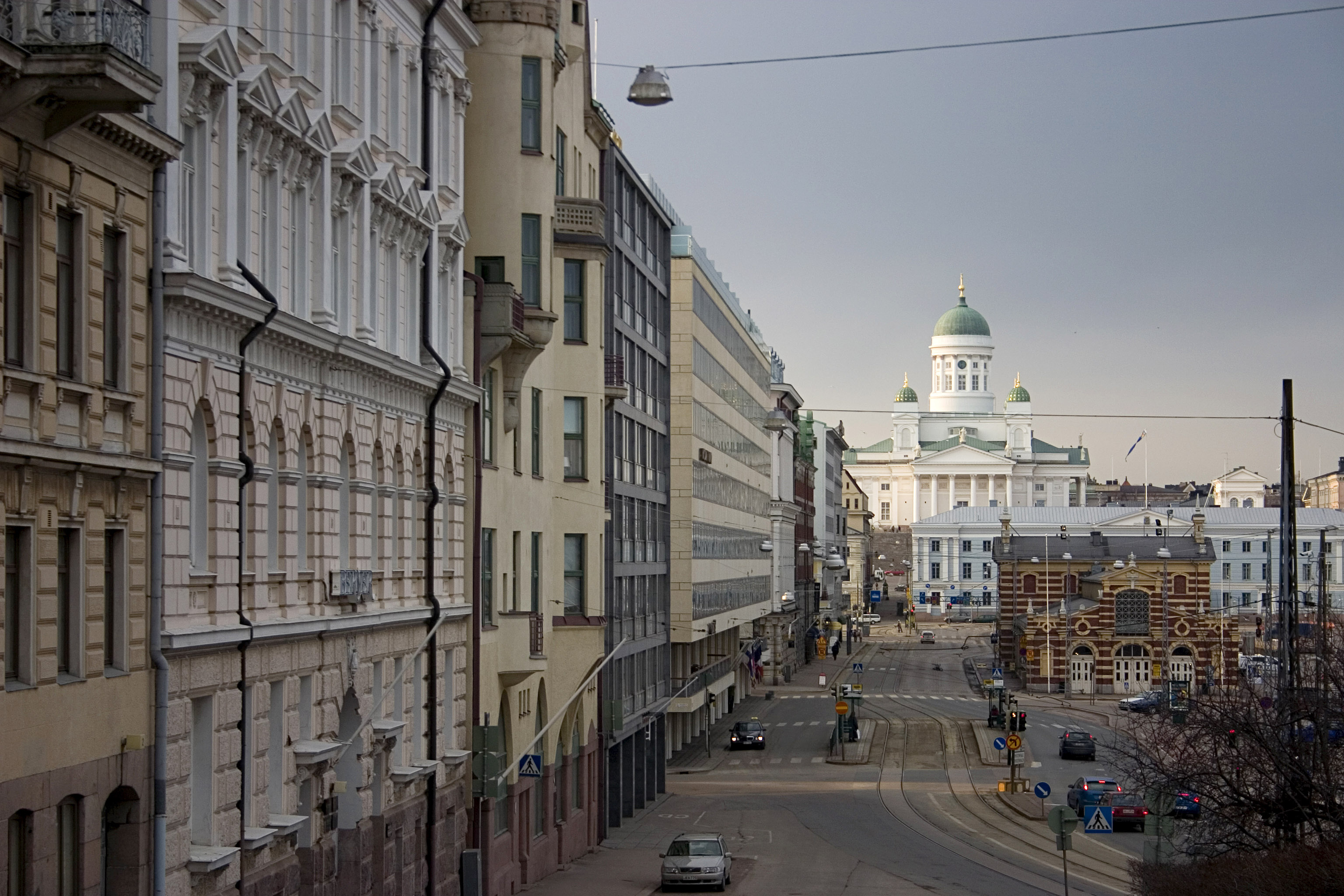 Helsingin Eteläranta. Oikealla on Vanha kauppahalli ja taustalla näkyy tuomiokirkko.